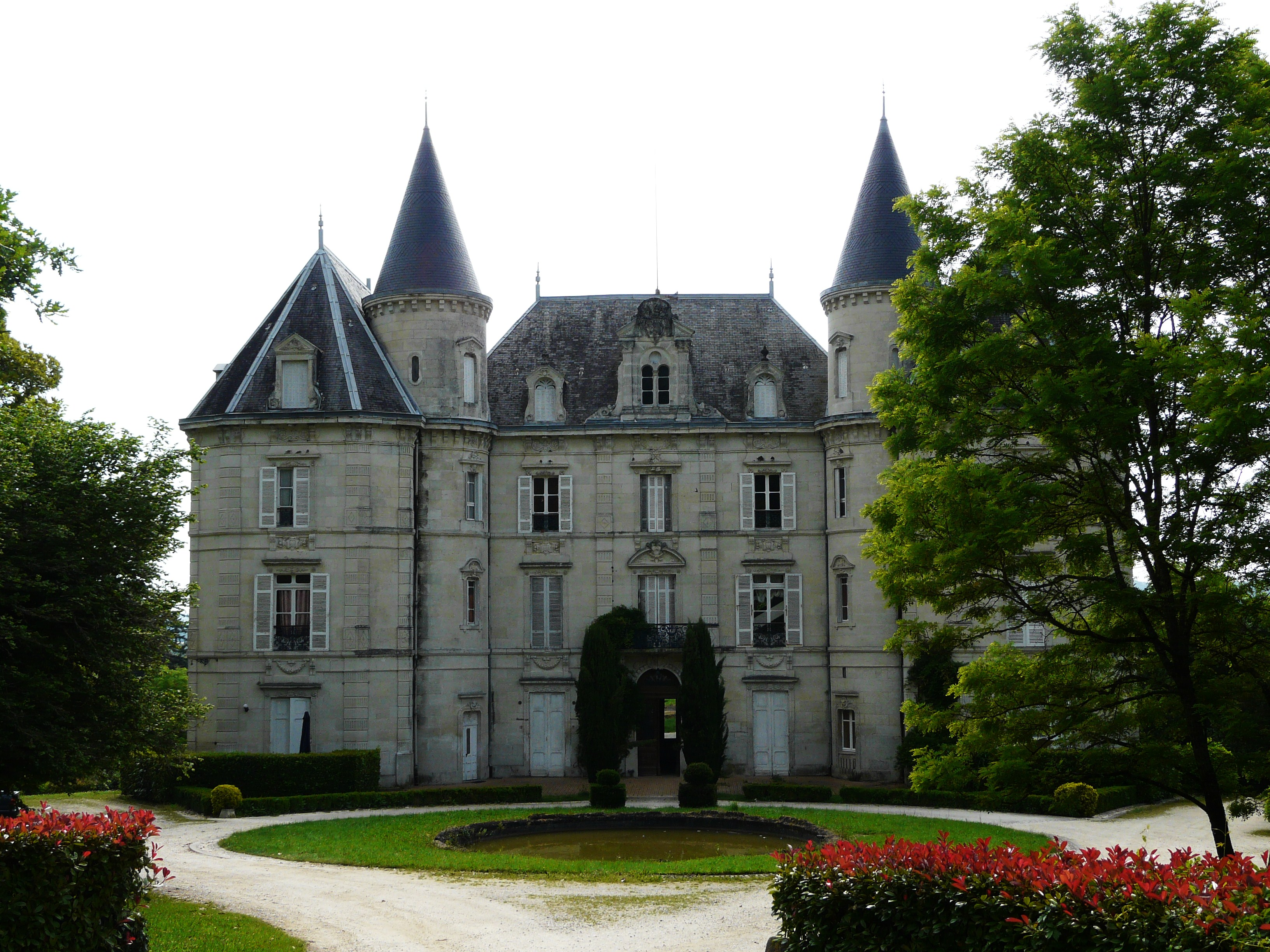 La façade ouest du château de la Roche à Annesse-et-Beaulieu, Dordogne, France